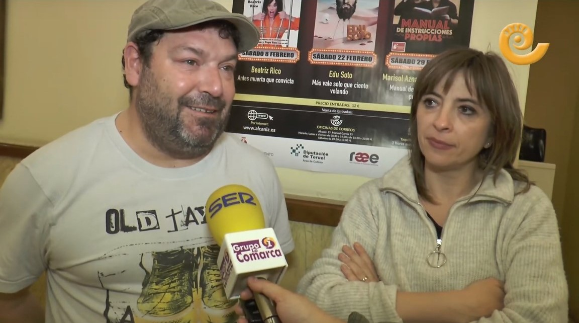 Los humoristas aragoneses Jorge Asín y Marisol Aznat en Alcañiz, en el año 2020.